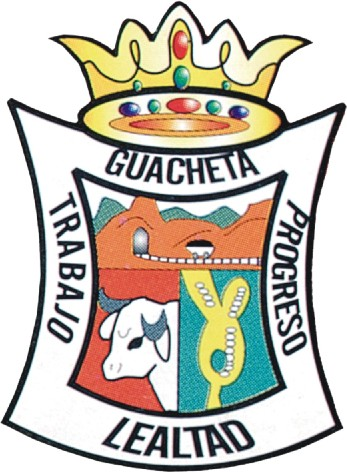 Este es el escudo de guacheta